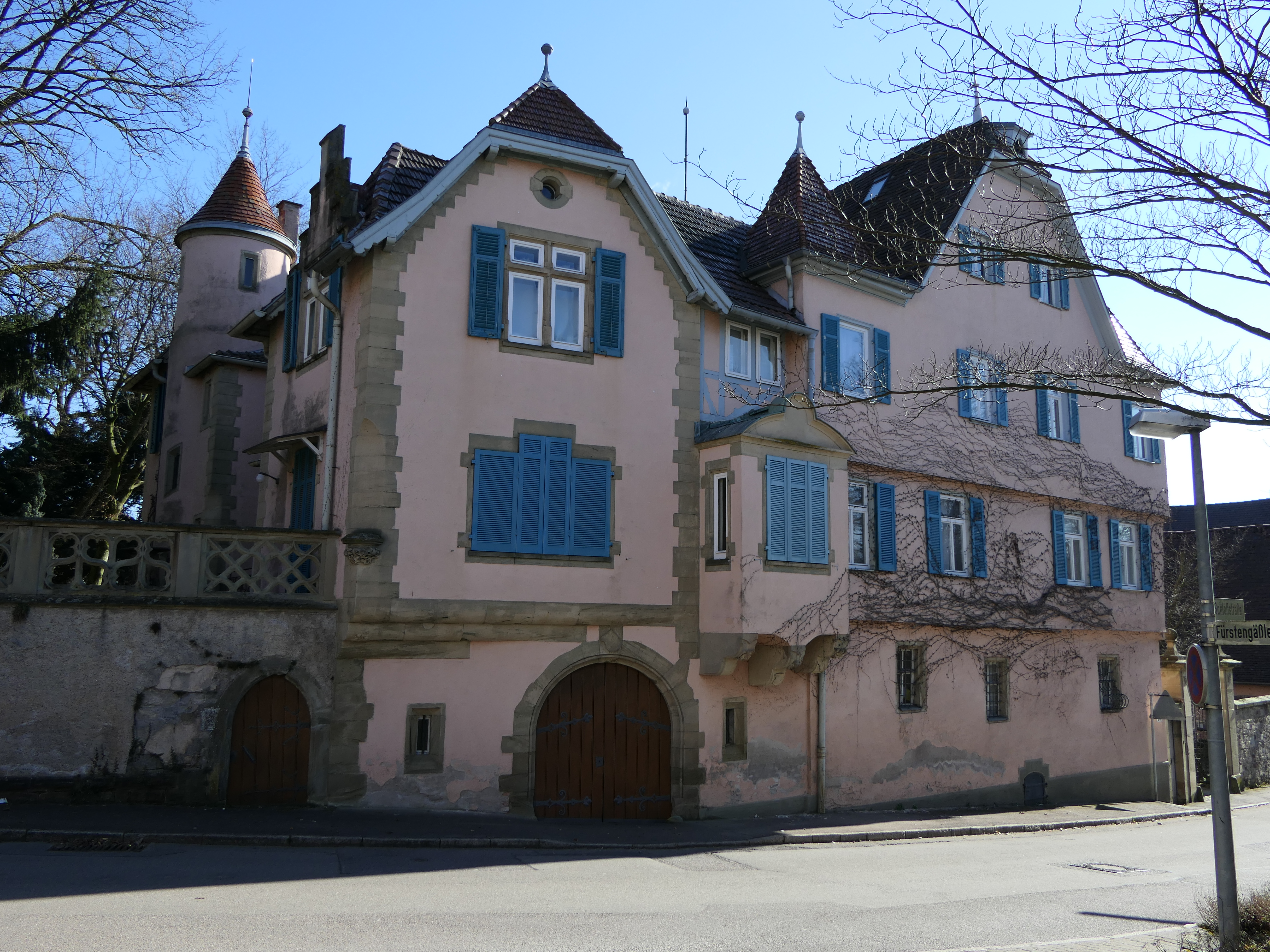 Das Schloss Grossheppach im gleichnamigen Teilort der Stadt Weinstadt im Rems-Murr-Kreis.